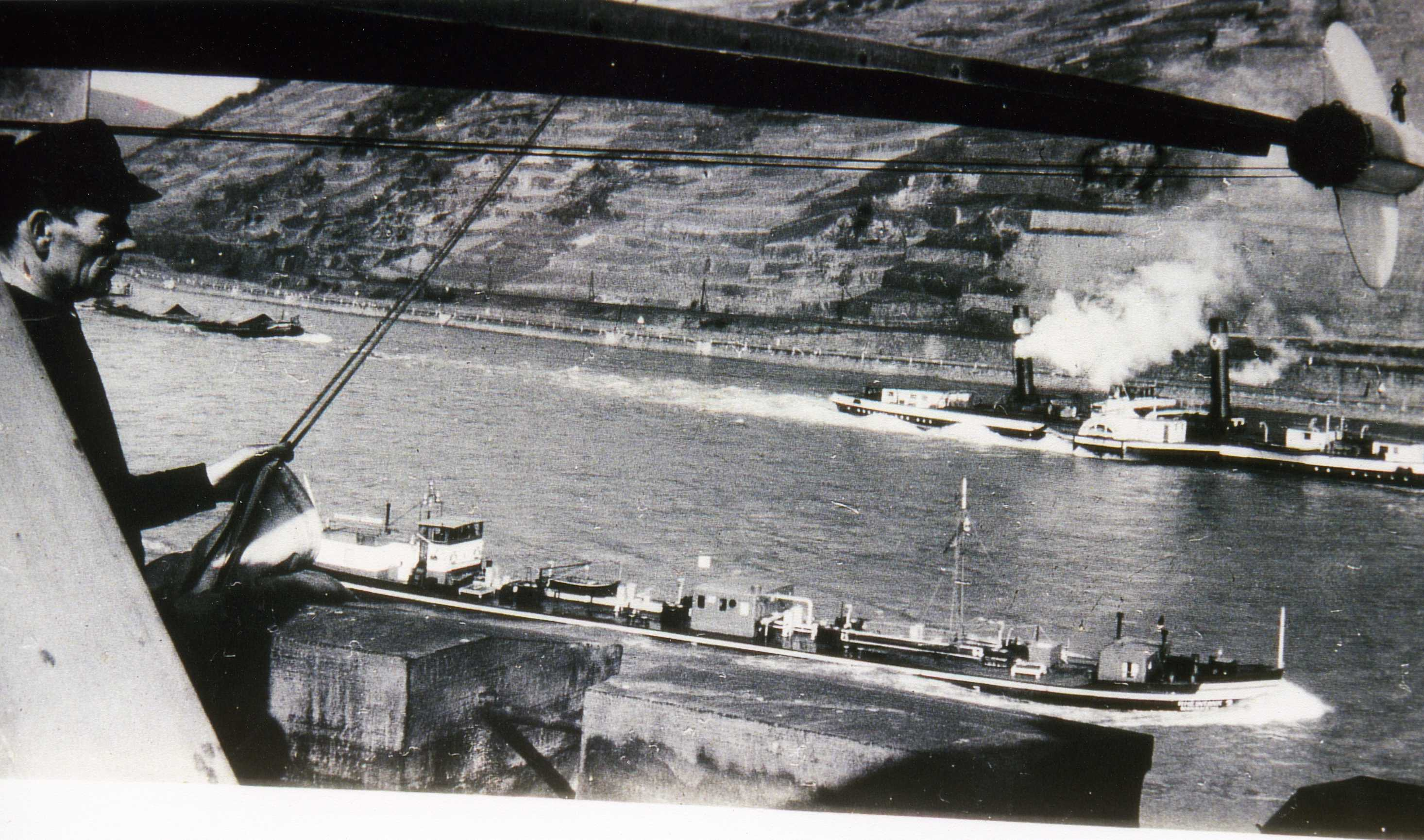 Das Bild zeigt den Wahrschauer Anton Berges bei seiner Arbeit auf dem Mäuseturm bei Bingen.